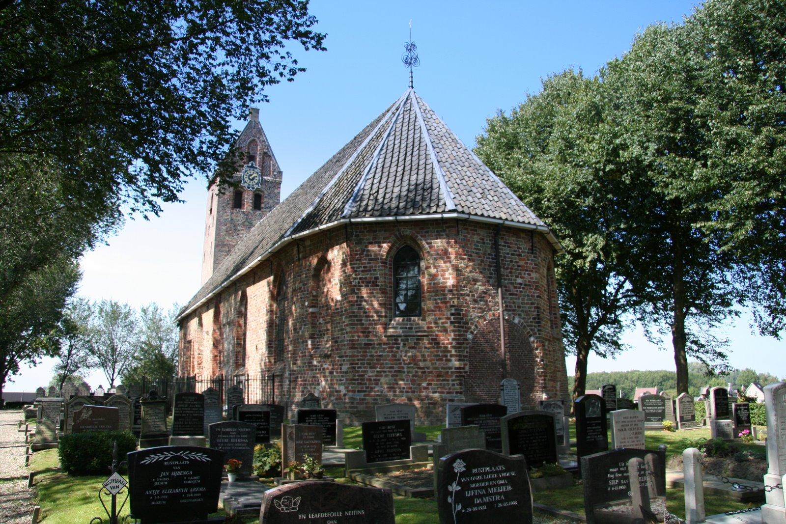 Kerkje van Jelsum